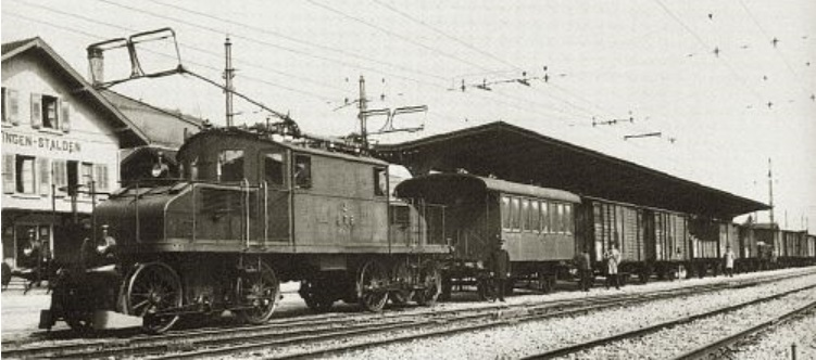 Lokomotive Ce 4/4 der Burgdorf-Thun-Bahn (BTB) von 1909 im Bahnhof Konolfingen-Stalden im Emmental.